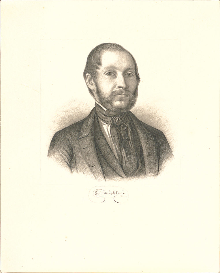 Selbstportrait des Malers und Zeichners Eduard Bürklein, Sammlung Architekturmuseum der Technischen Universität München